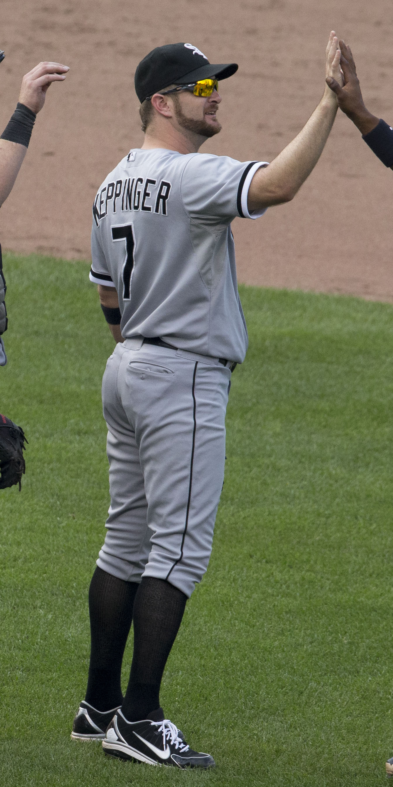 Jeff Keppinger